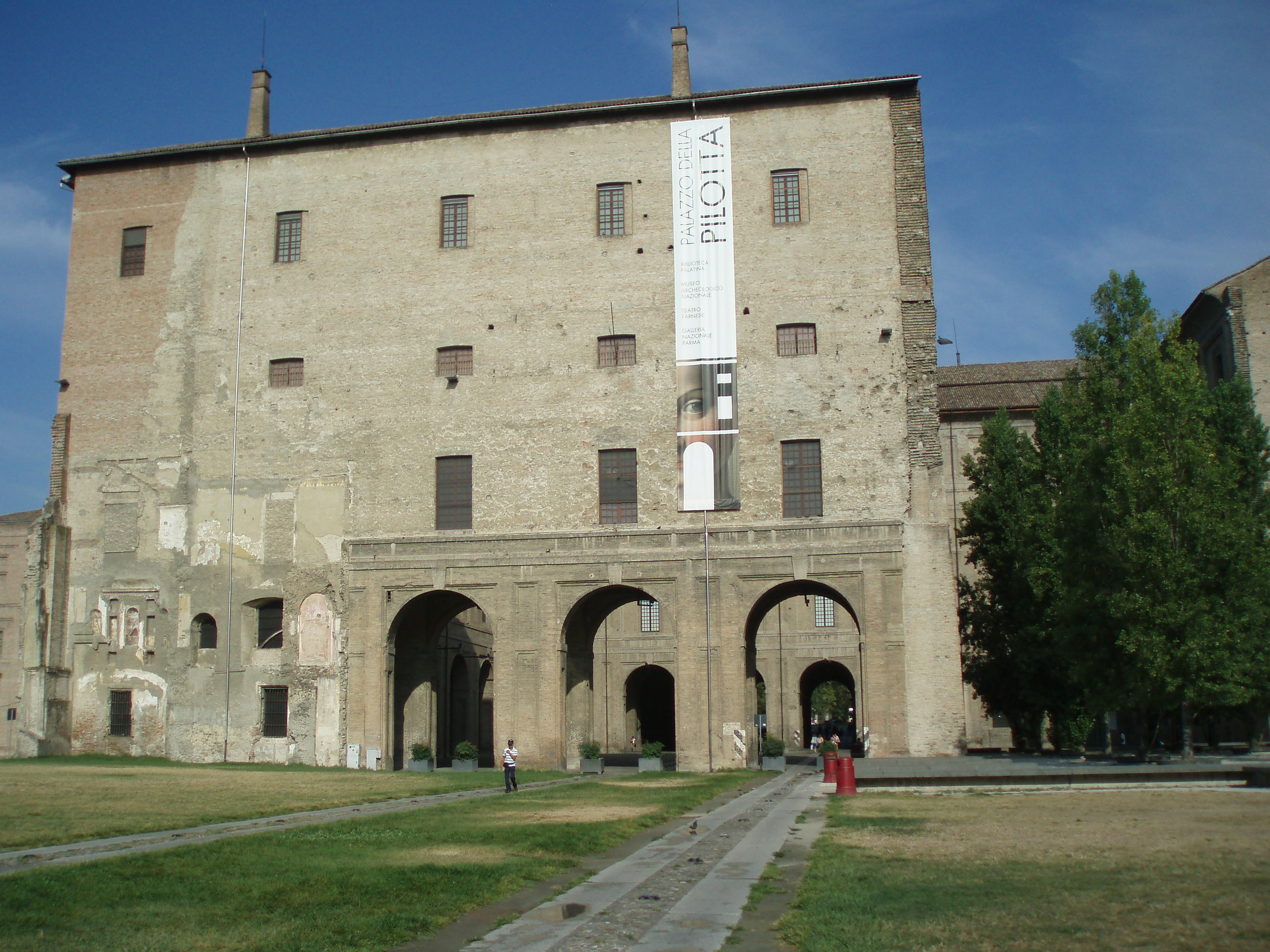 Museo Archeologico Nazionale - MIBAC This is a photo of a monument which is part of cultural heritage of Italy.